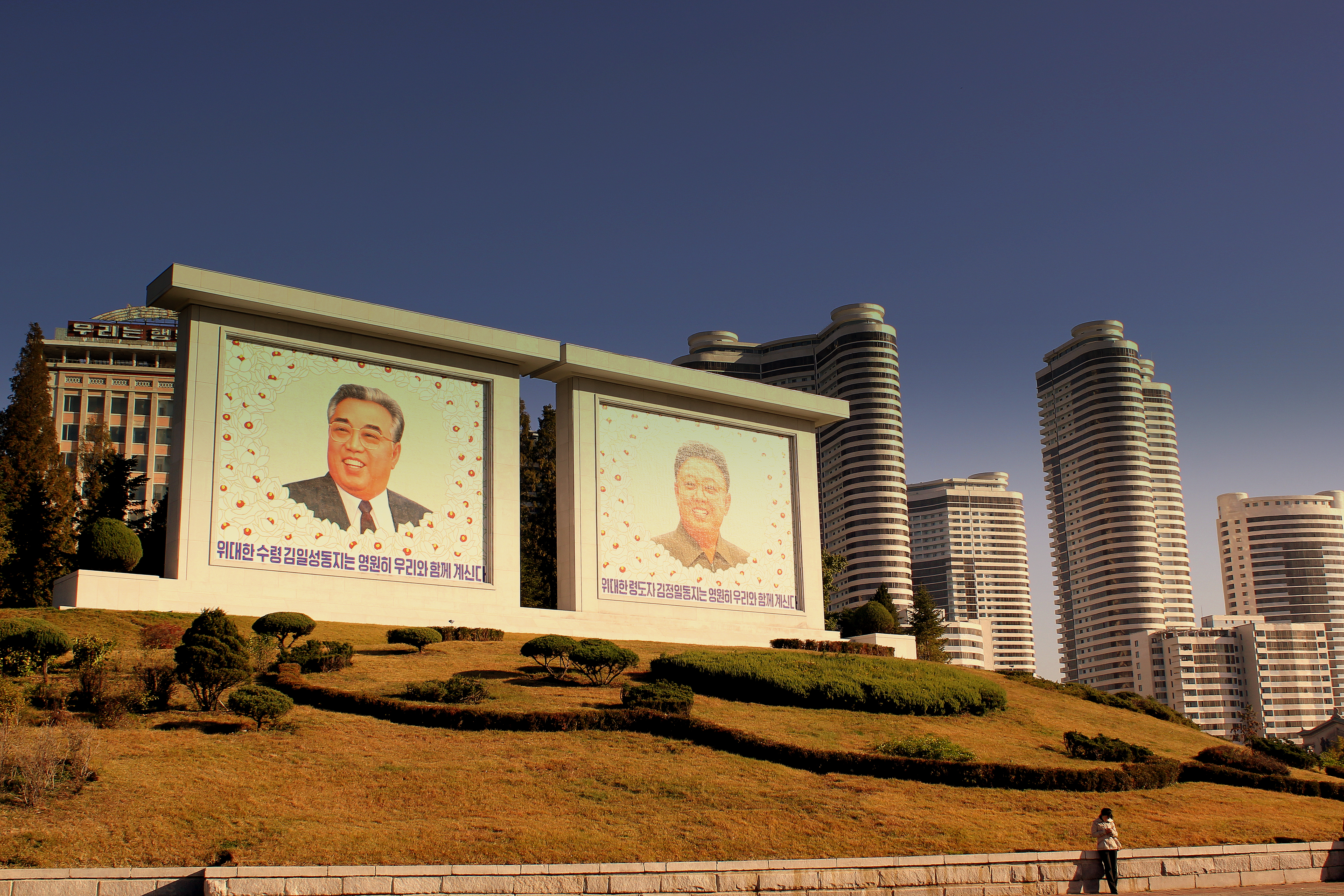 PYONGYANG CITY DPR KOREA OCT 2012